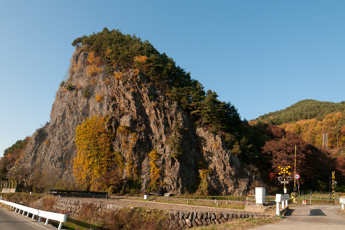 聖岩（天狗岩）、長野県南佐久郡佐久穂町。小海線高岩-馬流間。